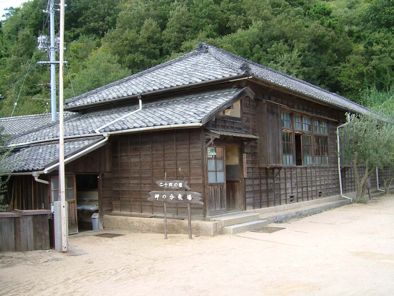 旧苗羽小学校田浦分校